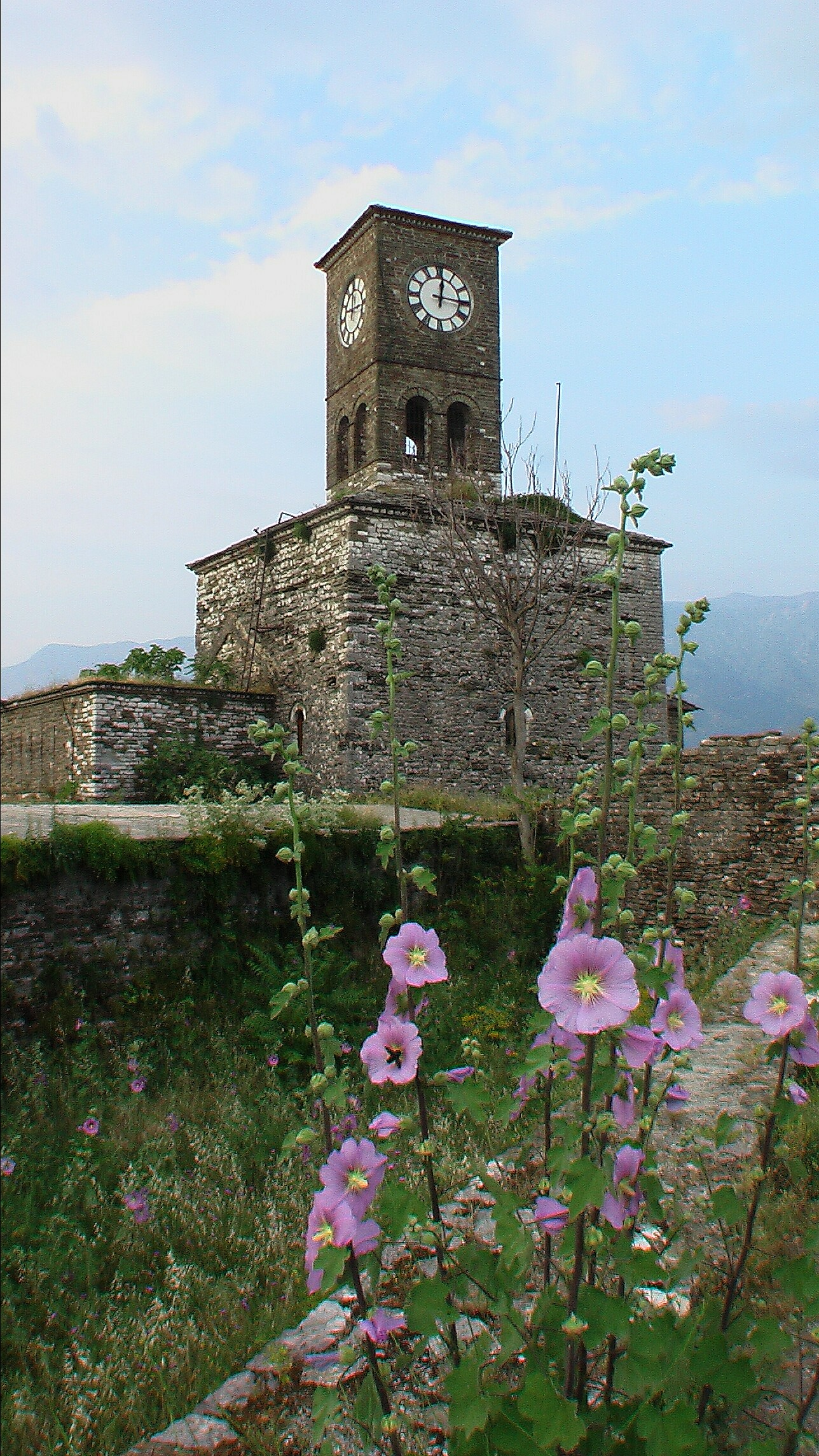 GjirokastraBurgfelsenUhrturm